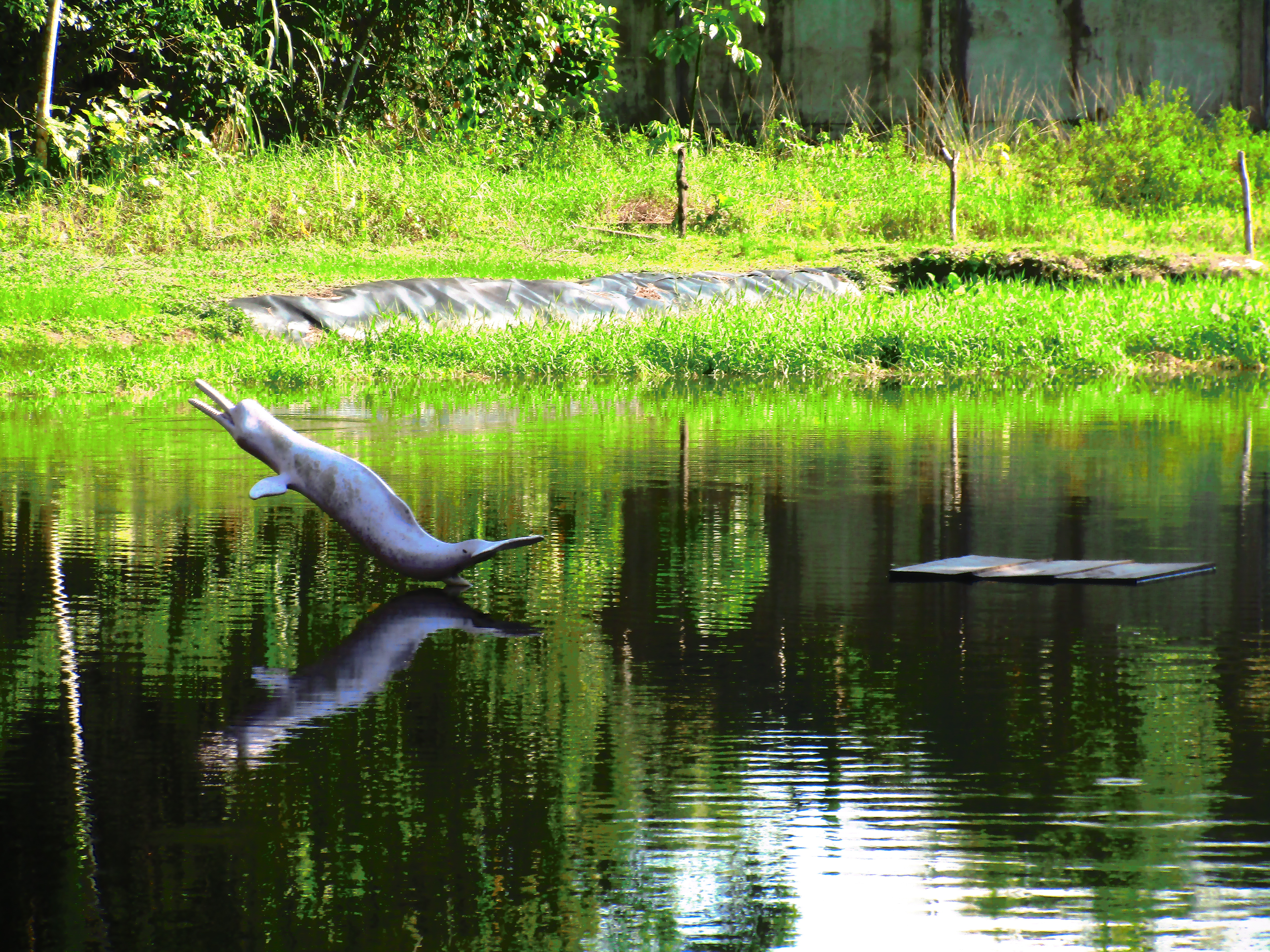 Estatua de un delfín rosado representando la leyenda del bufeo colorado. Los Paucares Inn, Iquitos, Perú